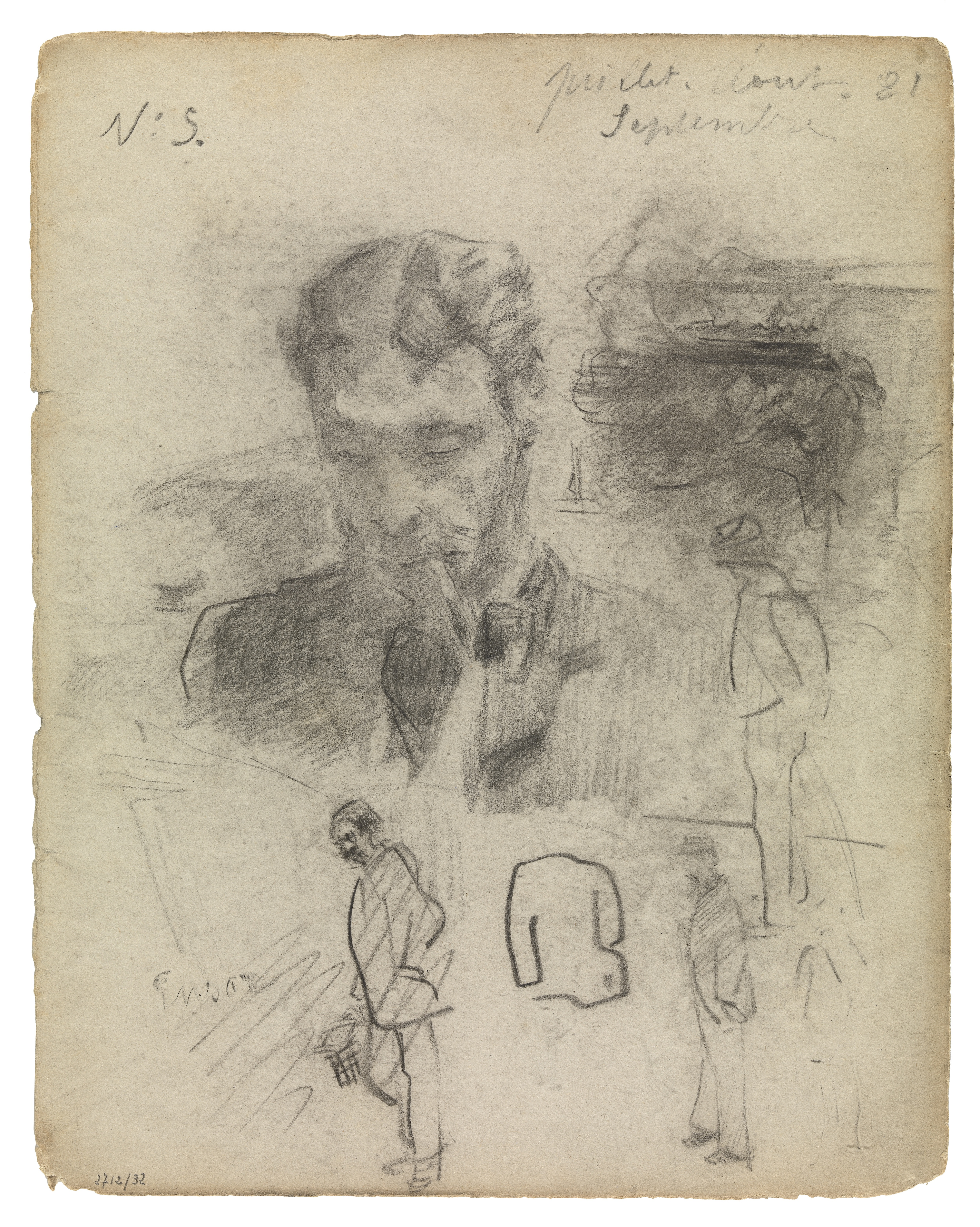 Theo Hannon met pijp, (James Ensor, 1880); collection: Koninklijk Museum voor Schone Kunsten Antwerpen